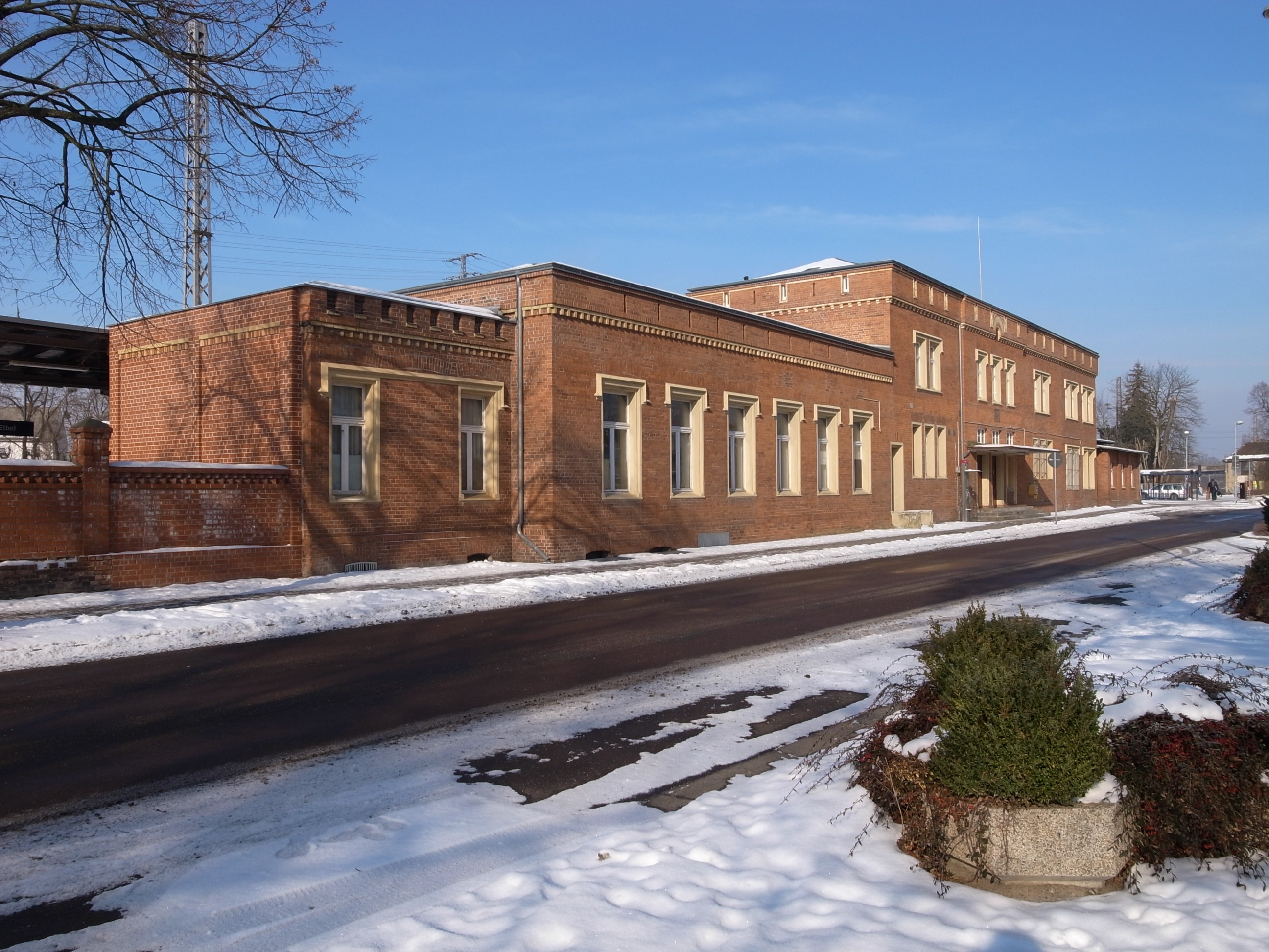 Dessau-Roßlau, OT Roßlau (Elbe), Dessauer Straße 52, Empfangsgebäude, Bahnhof (Baudenkmal im Denkmalverzeichniss Sachsen-Anhalt, Erfassungsnummer: 094 40874 000 000 000 000 [1])